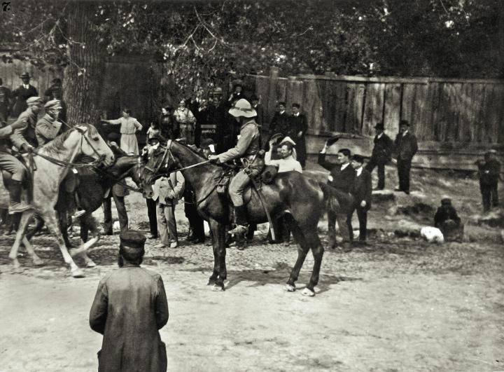 Wkroczenie I kompani kadrowej do Kielc, 12 sierpnia 1914 roku. Józef Piłsudski przyjmuje raport skauta Czesława Bankiewicza, który potem wstąpił do Legionów i zginął w boju.